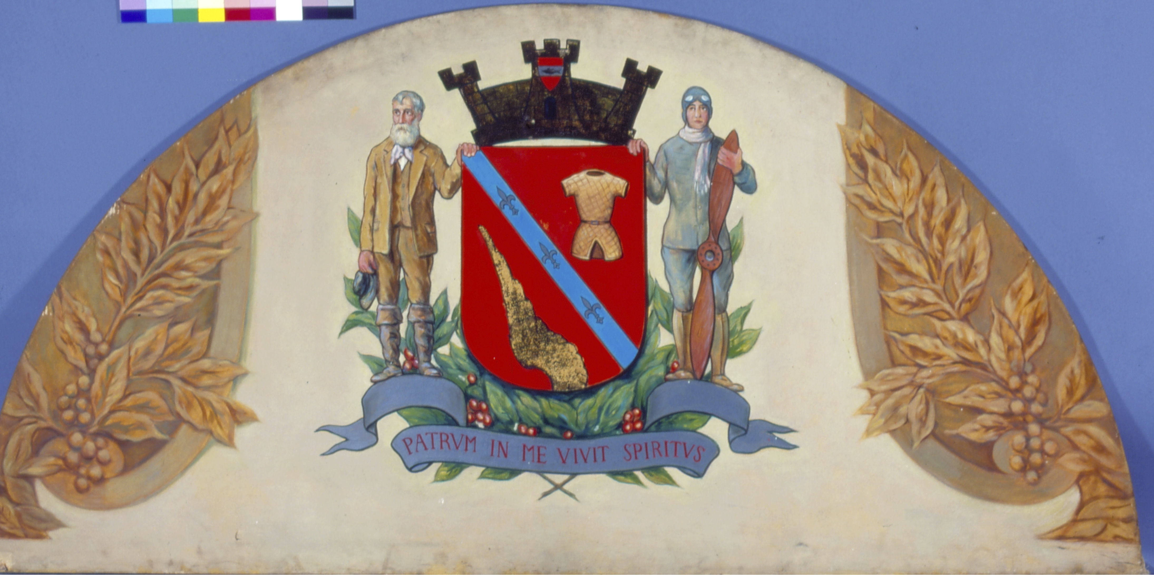 Obra que integra o acervo do Museu Paulista da USP. Coleção José Wasth Rodrigues - CJWR